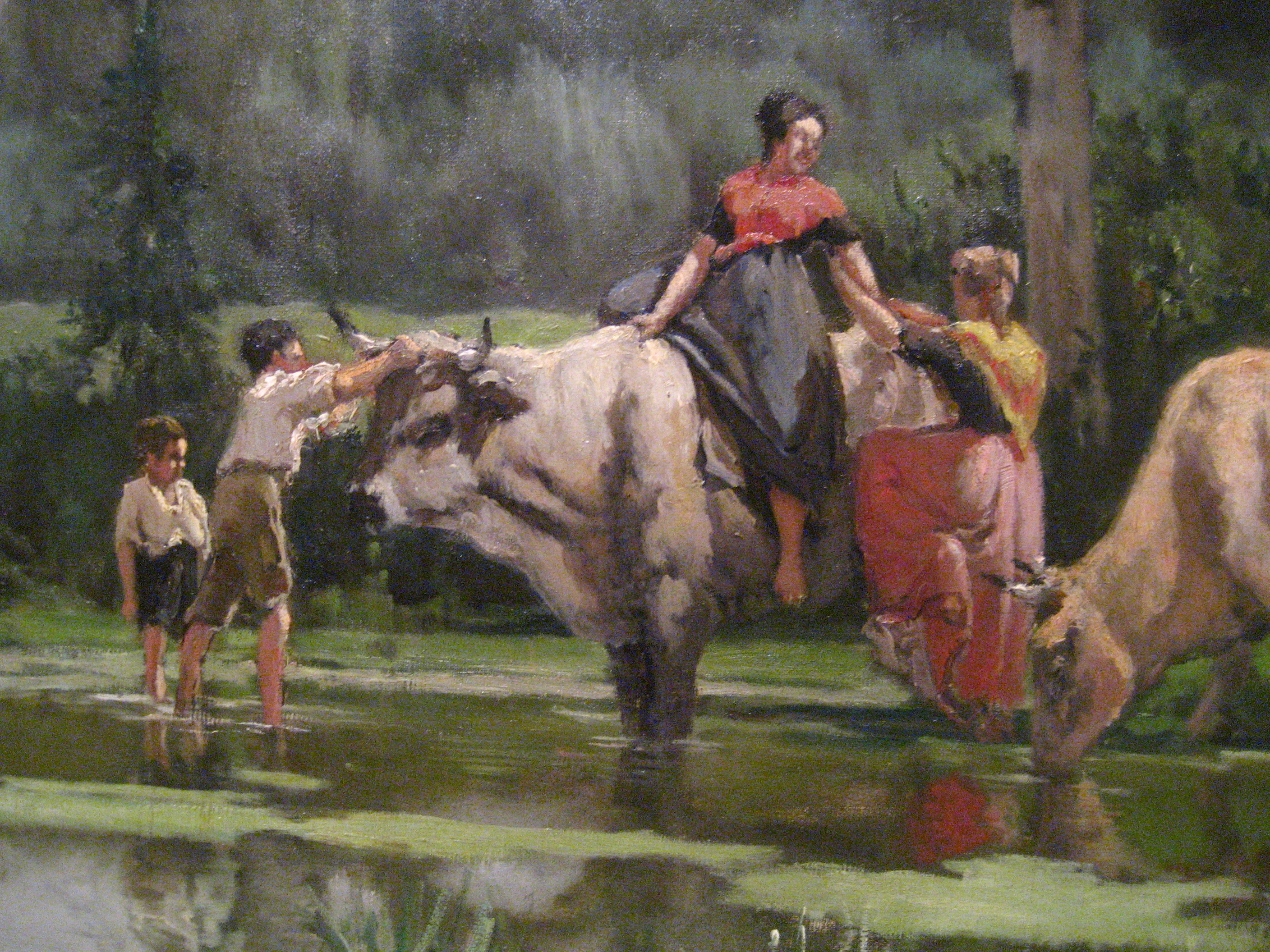 Grup central del llenç de Vayreda L'estiu